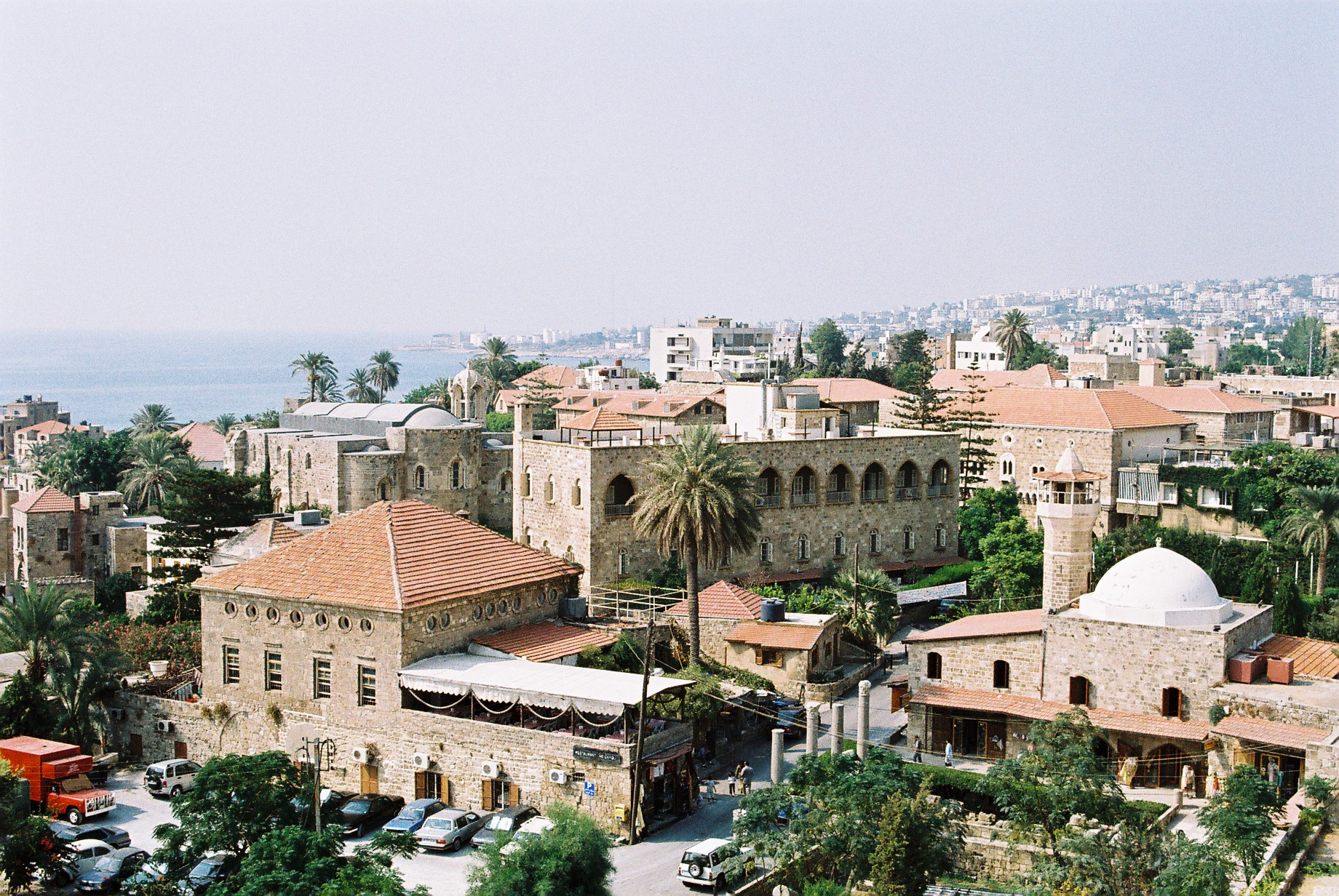 Byblos / Libanon 2003